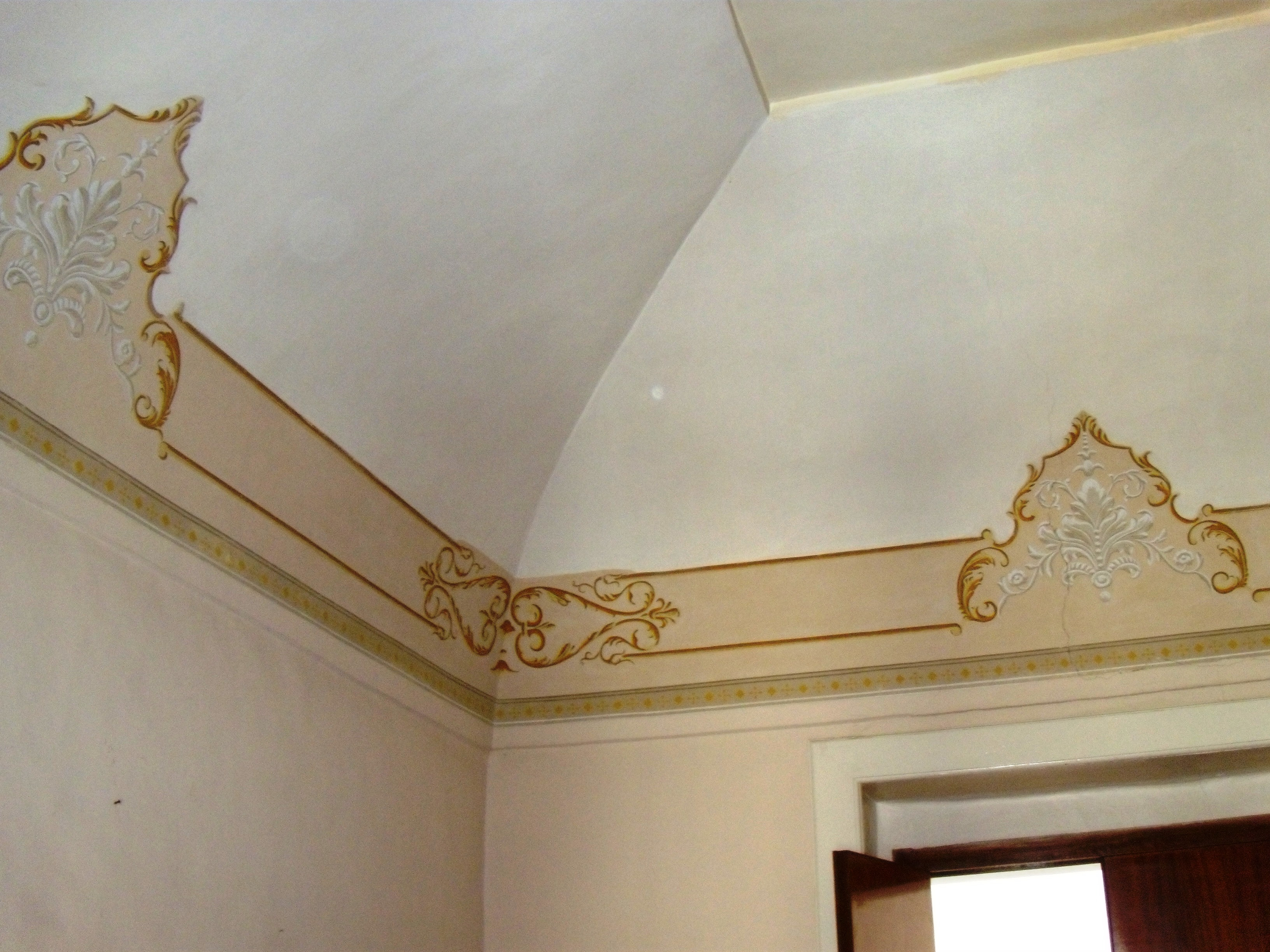 Volta decorata in una sala di Palazzo Ciaburro (via Biondi) in Cerreto Sannita (Bn).